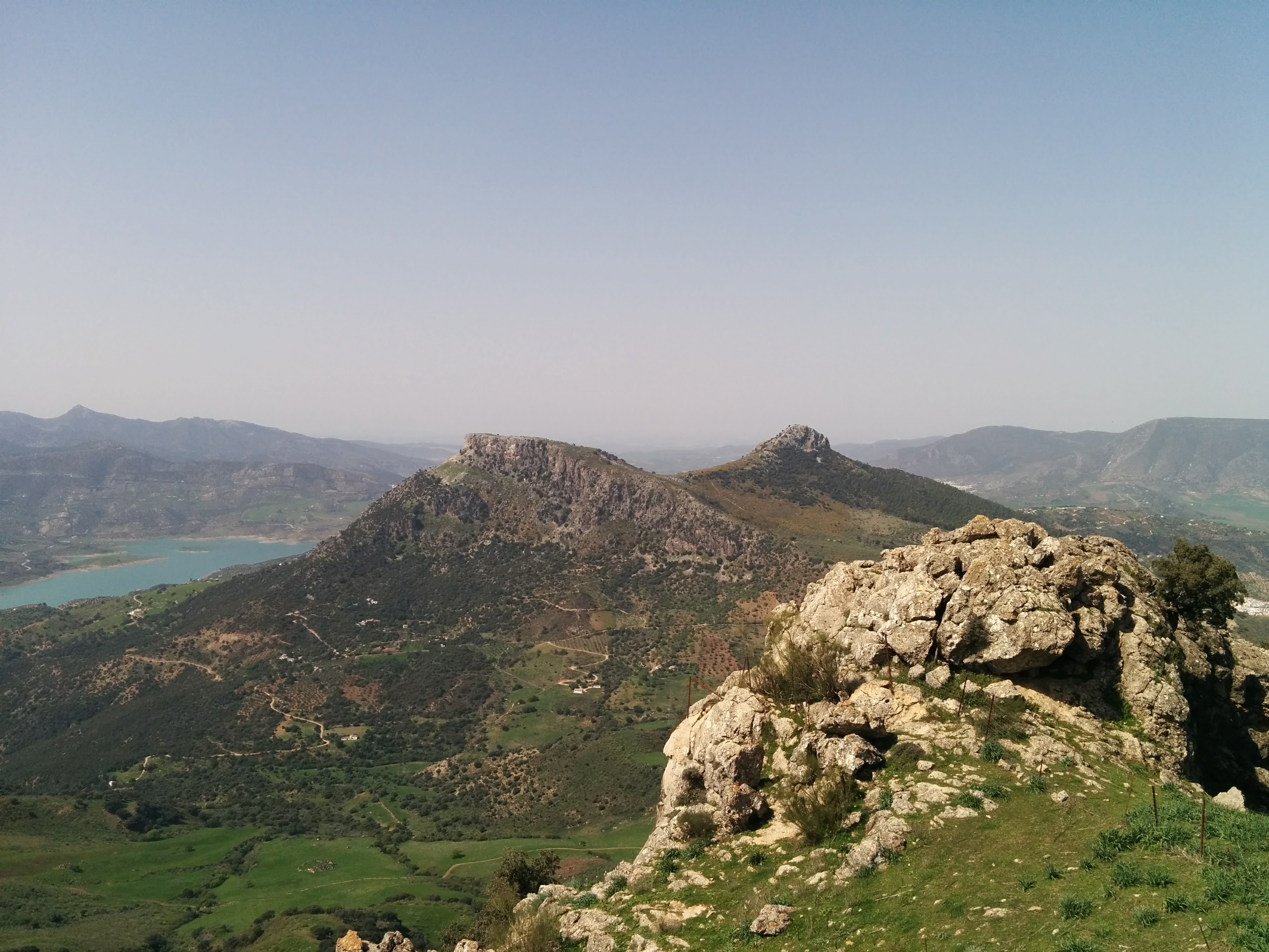 Imagen del Pico Lagarín (derecha) desde el Pico Malaver, en Marzo de 2017